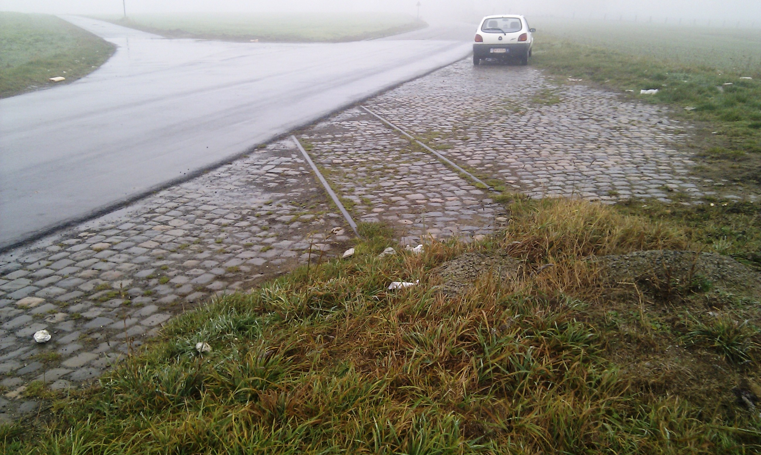 Restant van de normaalsporige aansluiting vanaf lijn 143 naar de suikerfabriek van Ramillies. Ramillies, Rue de la Frete. Lijn 143 was een buurtspoorlijn met gemengd spoor (meter en normaalspoor). De exploitatie van de normaalsporige aansluiting zal wel overgenomen zijn door de Belgische spoorwegen na de opheffing van de buurtspoorlijn.